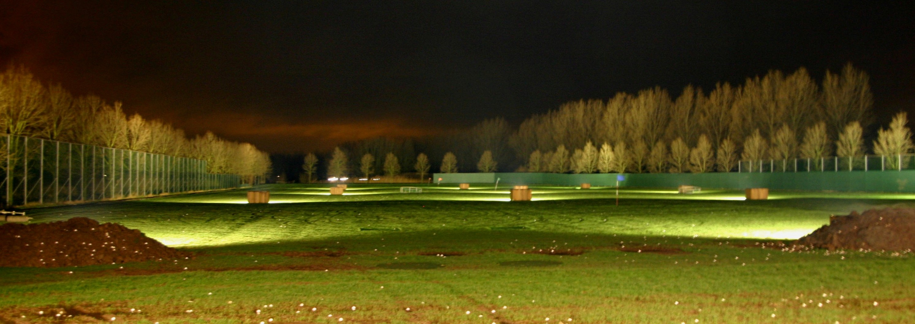 Foto van de verlichte driving range van GCZ